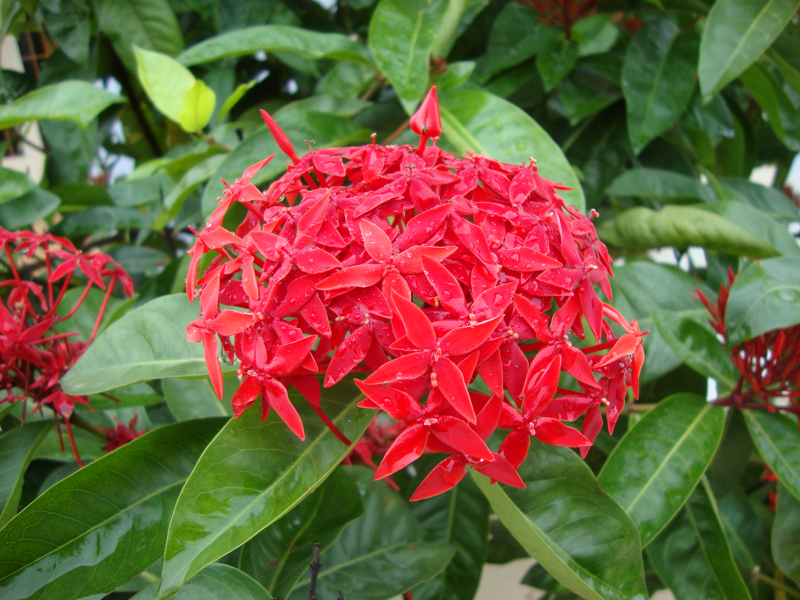 Ixora coccinea L., 1753Tiếng Việt: Trang đỏ